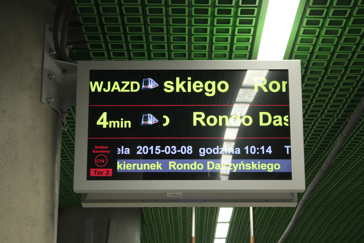 Monitor Systemu Informacji Pasażerskiej na stacji C14 Stadion Narodowy.